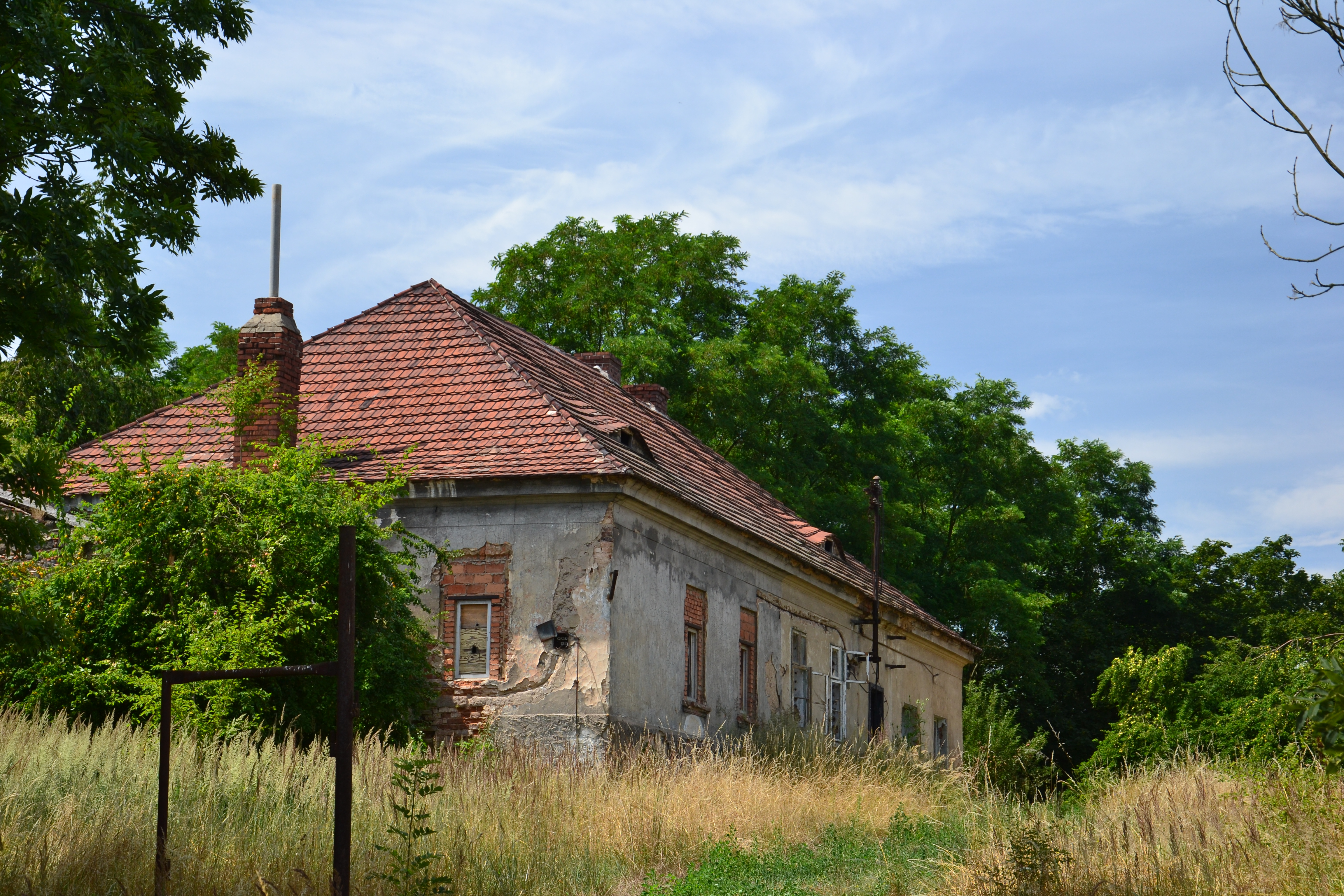 Tvrz, Hradiště 13, Hradiště (Bžany).